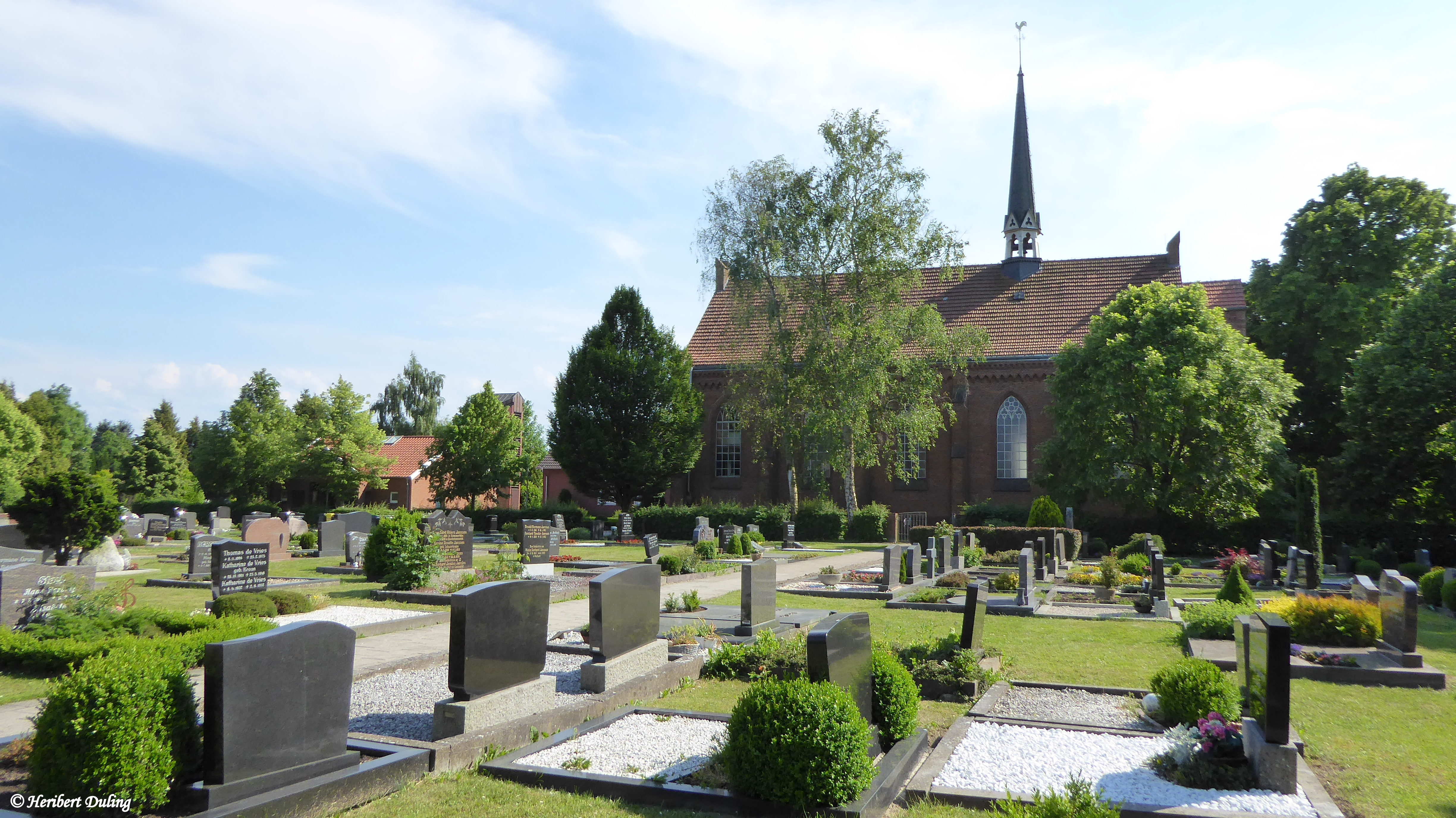 Ev.-ref.Kirche in Ditzumverlaat